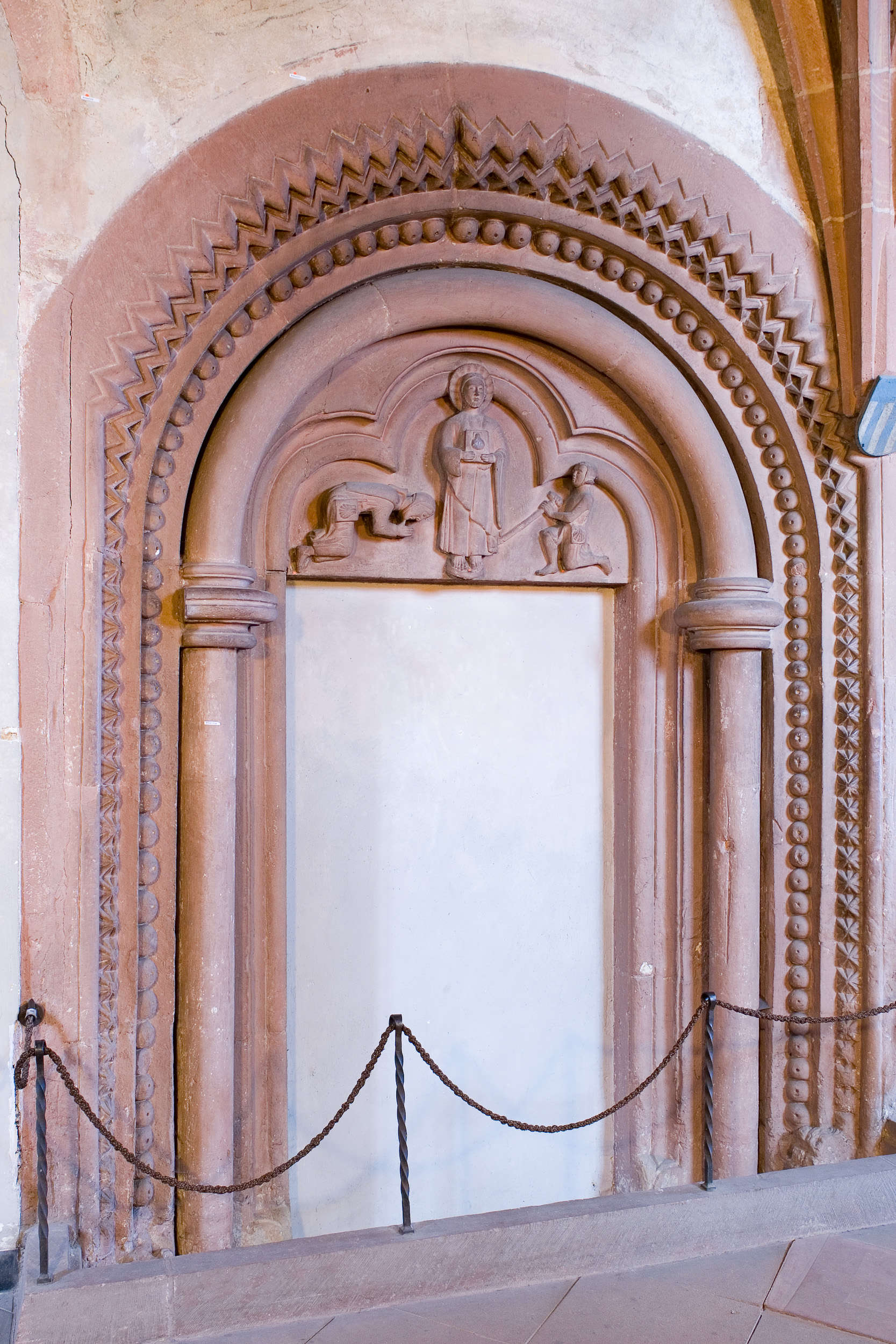 (zugemauertes) Romanisches Pilgerportal im nördlichen Seitenschiff der Leonhardskirche in Frankfurt am Main. Sein mit einem Kleeblattbogen geschlossener Tympanon stellt den stehenden heiligen Jakobus mit der Pilgermuschel und zwei ihn verehrende Pilger dar. Die Gewände und der Bogen des Portals zeigen Zickzack-, Nagelkopf- und Perlbänder. Im unteren Bereich, der weit unter dem Niveau des gotischen Bodens liegt, und somit nur schwer zu erkennen ist, laufen die Gewände im Westen in einem Fratzenkopf, im Osten in einem stilisierten Akanthusblatt aus. Die Kapitelle der inneren Säulen zeigen einfache Ringe, dazwischen spannt sich ein Wulst ohne jegliches Ornament. Selber fotografiert im März 2008, Doppellizensierung GFDL & CC-BY-SA 2.5. Ein Detailbild des Tympanons findet sich hier